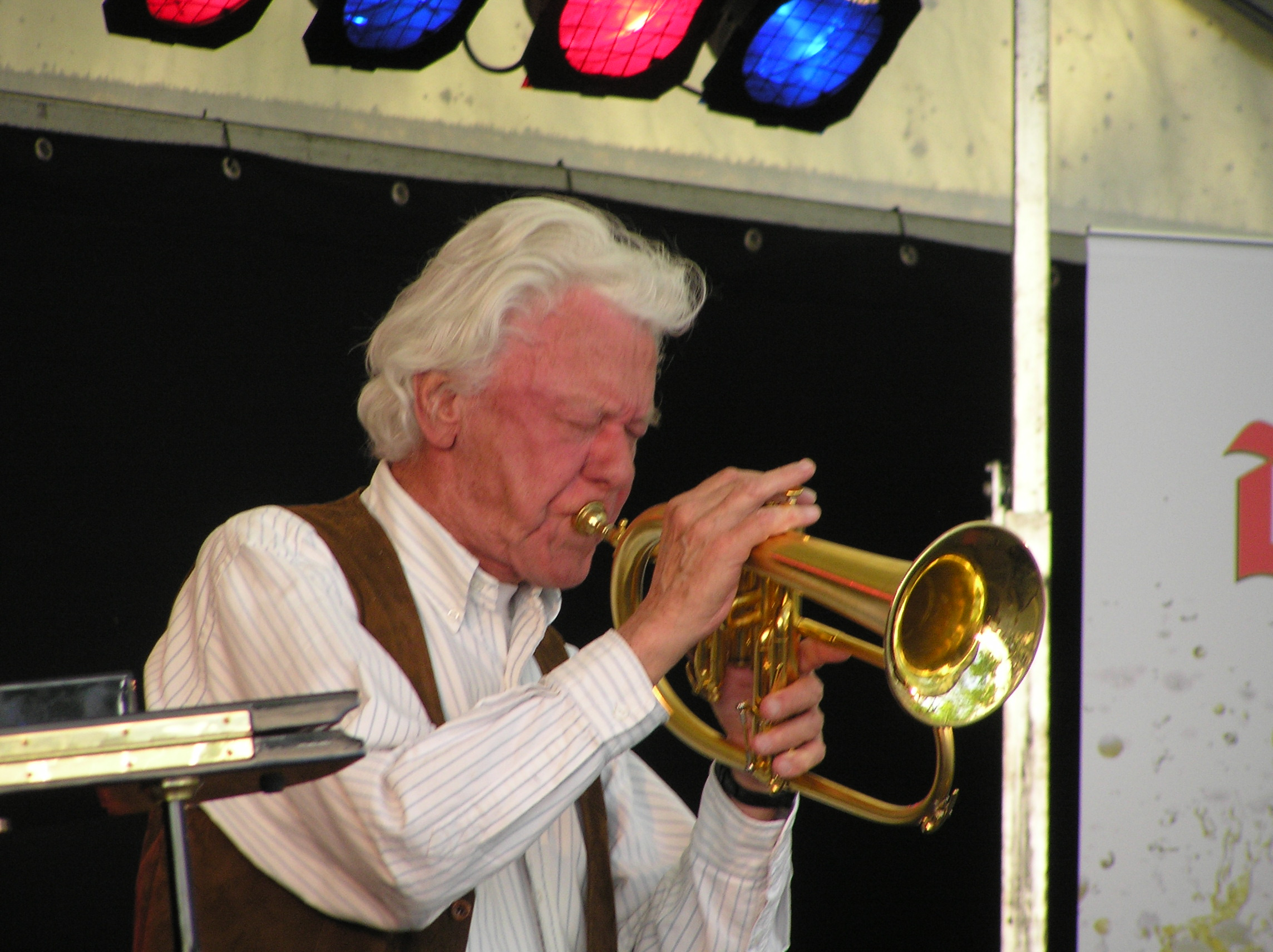 Ack van Rooyen @International Jazz Festival Middelburg